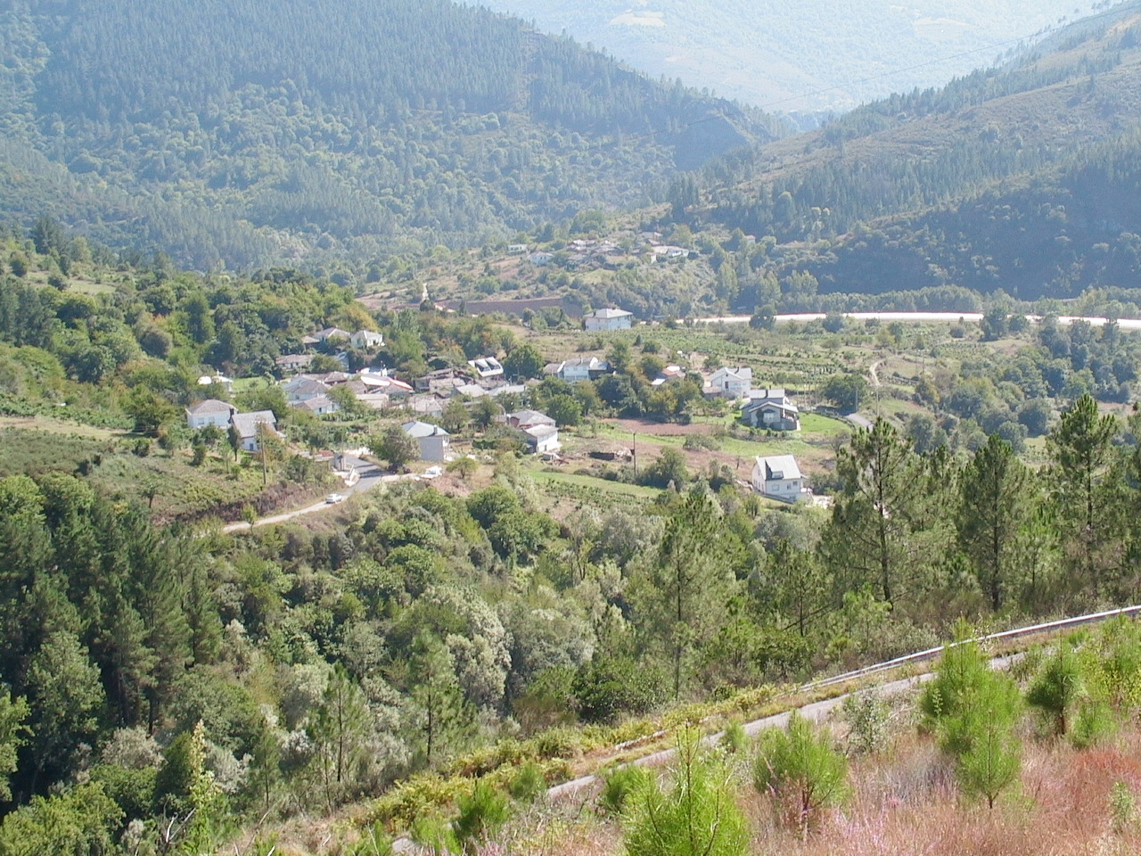 Vista del pueblo de Margaride de Lor